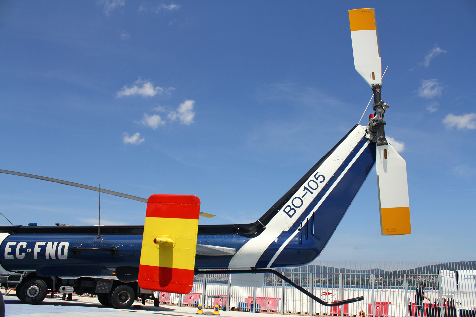 Del 22 al 28 de junio de 2012 se celebran en Vigo unas Jornadas Policiales, que incluyen una exposición del Cuerpo Nacional de Policía en la Estación Marítima de la ciudad. Las Jornadas se iniciaron con un simulacro de operación antiterrorista en el muelle de la Estación Marítima. El simulacro contó con la participación de tres miembros del Grupo de Operaciones Especiales y Seguridad (GOES) de Galicia, coches patrulla, el helicóptero de la Policía basado en el Aeropuerto de Peinador (que llevó en su puerta de babor a un tirador de élite del GOES para apoyar la operación), una unidad de guías caninos y agentes del Grupos de Desactivación de explosivos y NRBQ, con un vehículo de desactivación. Vigo Police Conference, 22-28 June 2012 From 22th to 28th June 2012 held a Police conference in Vigo, including an exhibition of the National Corp of Police in the Maritime Station of the city. The conference began with a simulation of anti-terrorist operation in the dock of the ferry terminal. The simulation was attended by three members of the Special Operations and Safety Group (GOES) of Galicia, patrol cars, the police helicopter based at the Peinador Airport (carrying an elite shooter of the GOES to support the operation), a unit of dog handlers and agents of the Explosive Ordnance and NRBQ Group, with a deactivation vehicle.